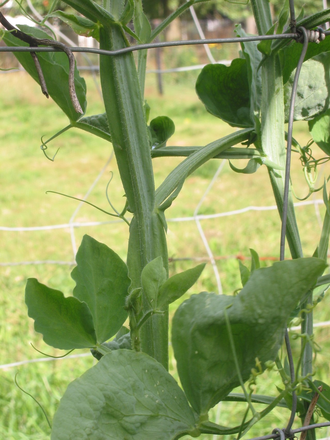 (nl: gevleugelde stengel van Lathyrus) Lathyrus odoratus stem